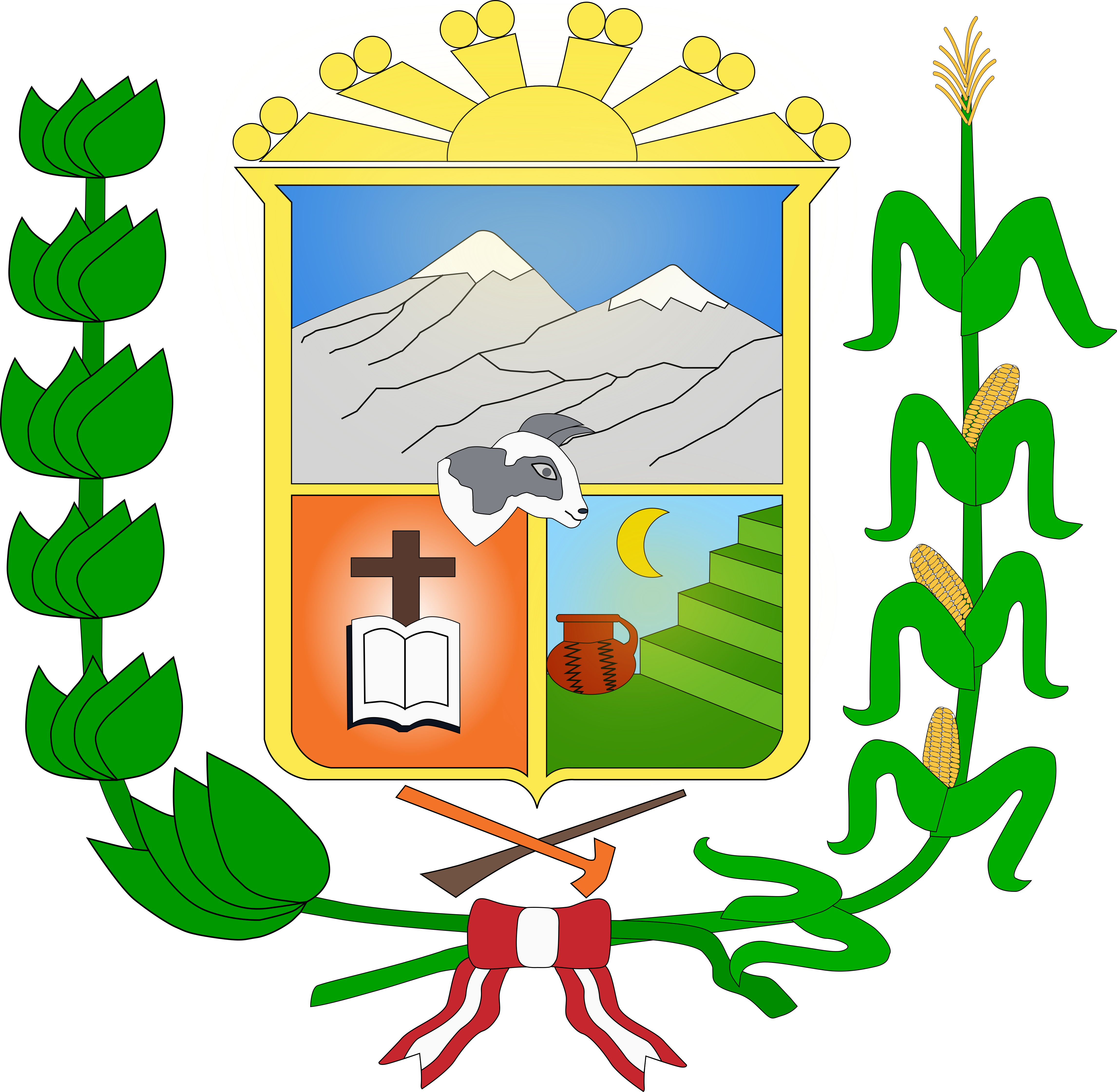 versión 2 luces y sombras